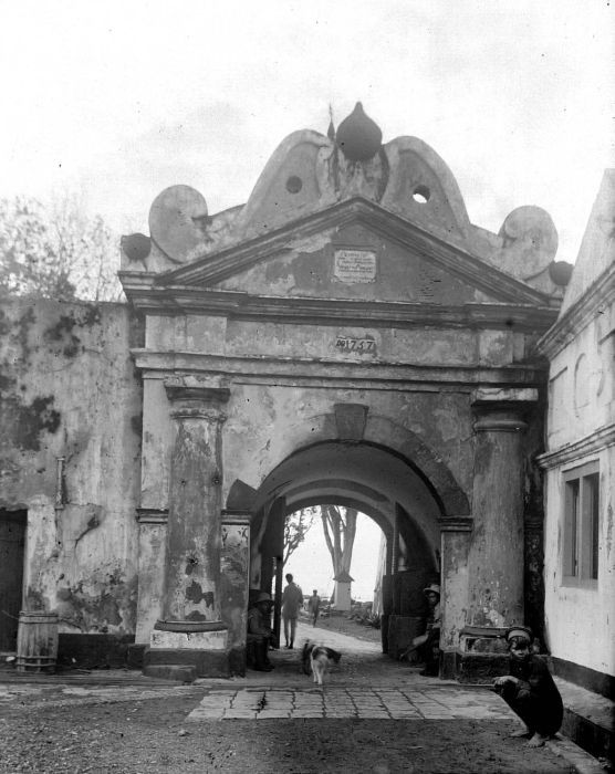 Negatif. Gerbang Fort Oranje, Ternate